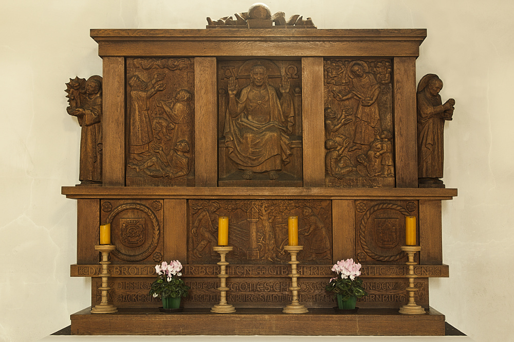 Bäckeraltar St. Agatha Aschaffenburg